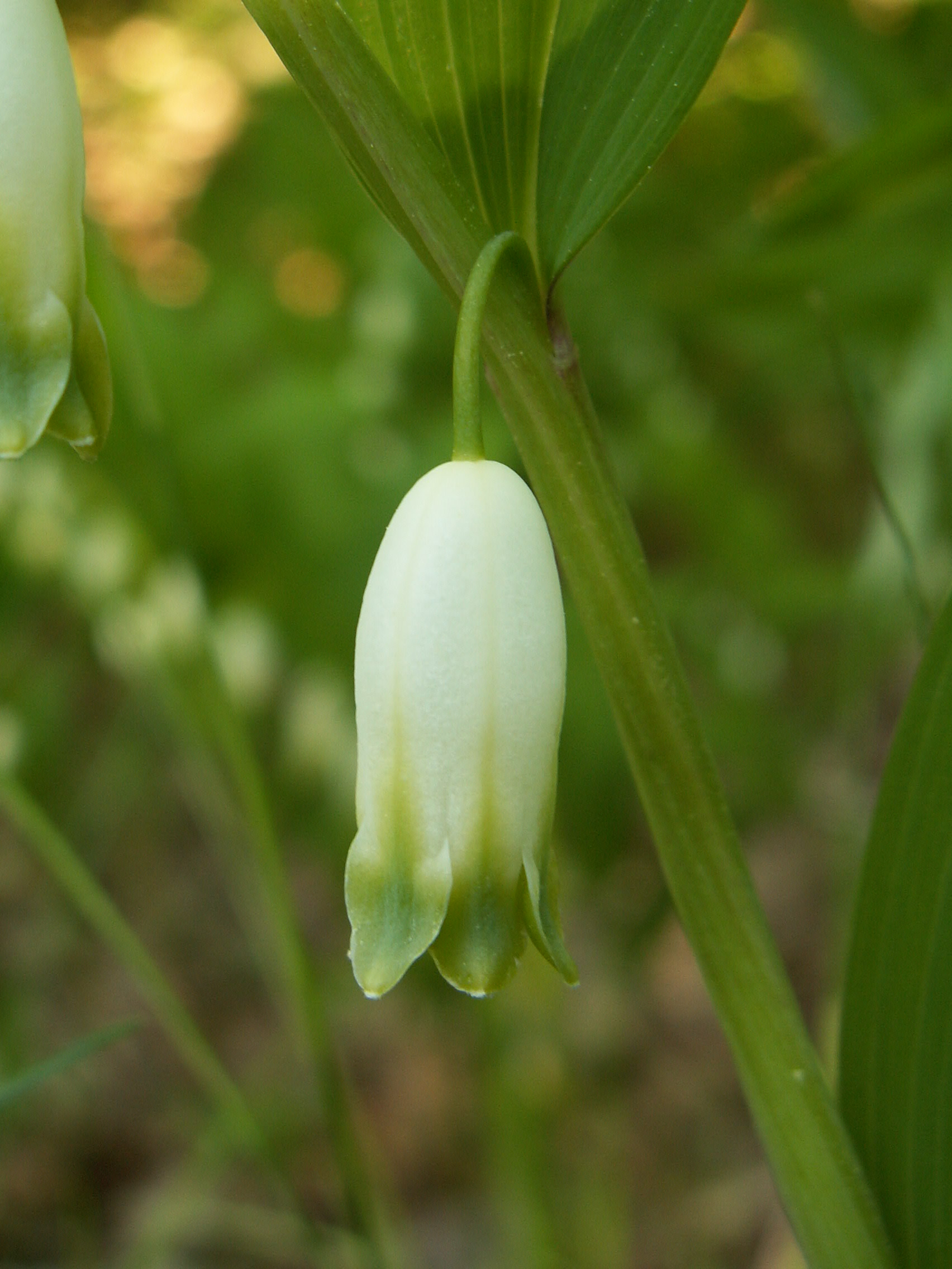 Polygonatum odoratum, flower. Swinoujscie, NW Poland